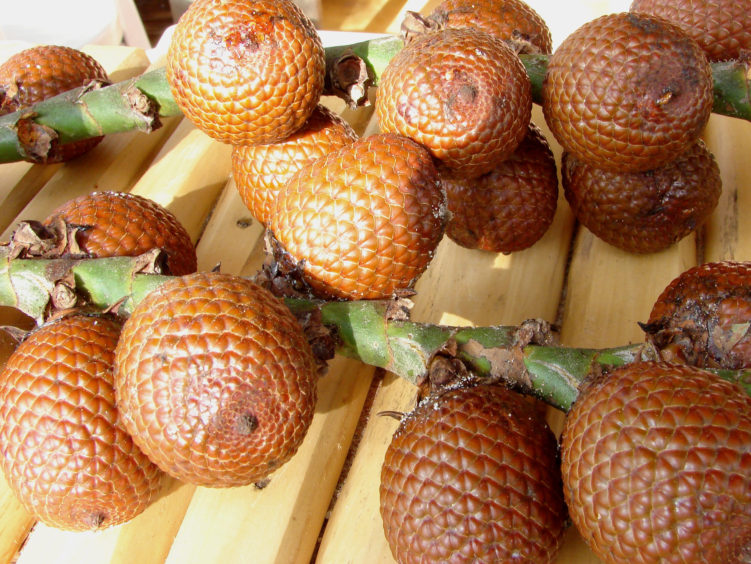 Mauritia flexuosa fruits (seeds).(pt=buriti)